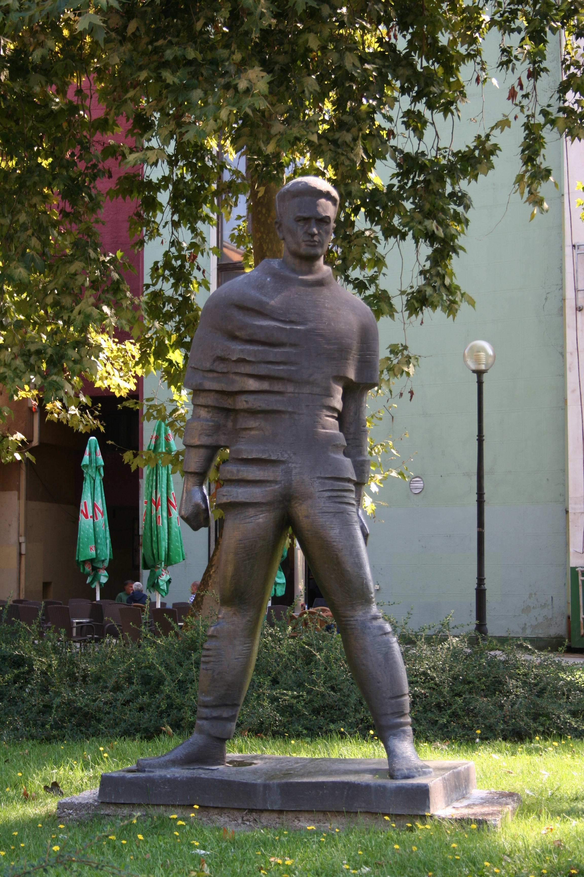 Spomenici Valjevo